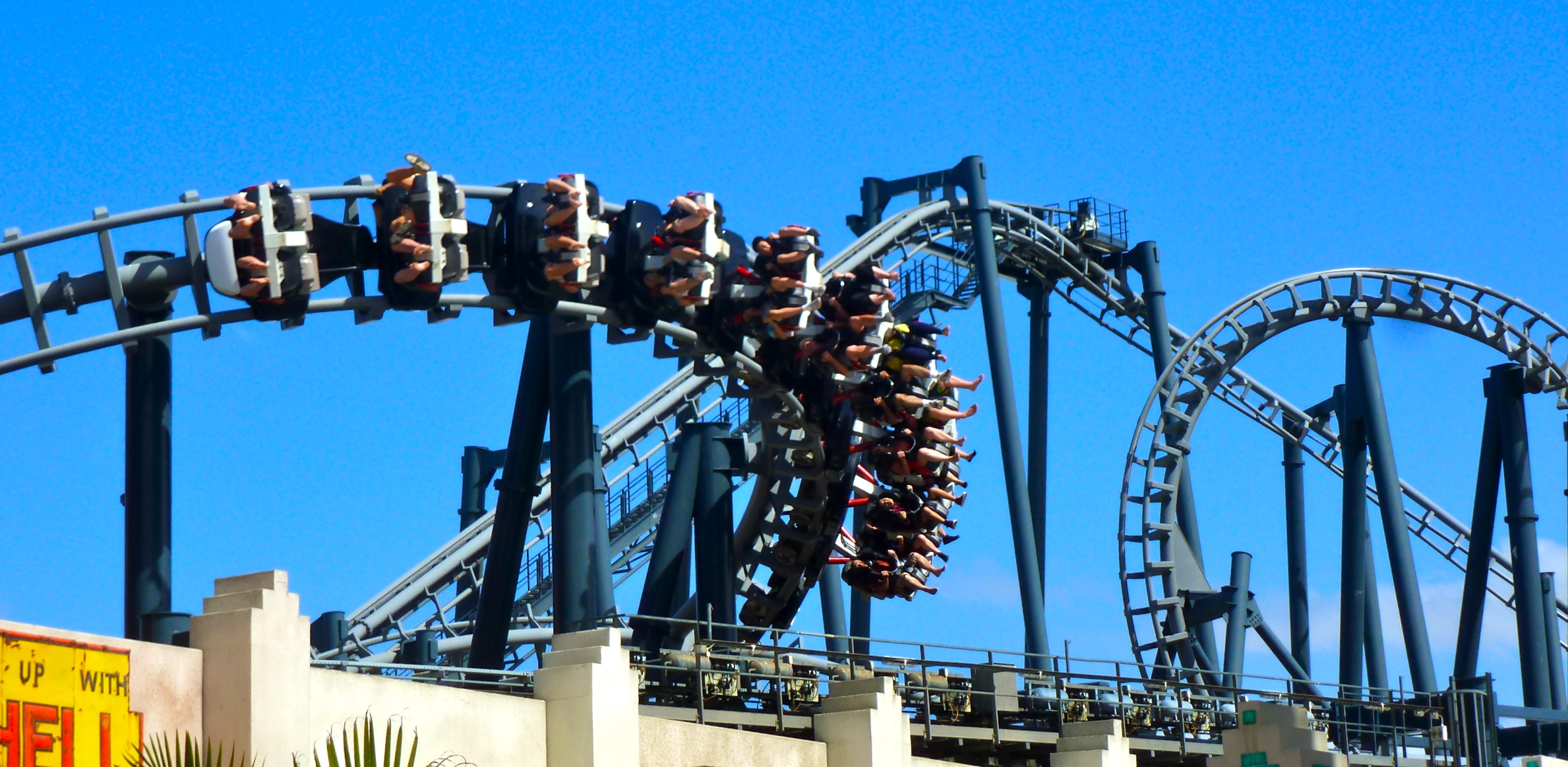 Movieworld